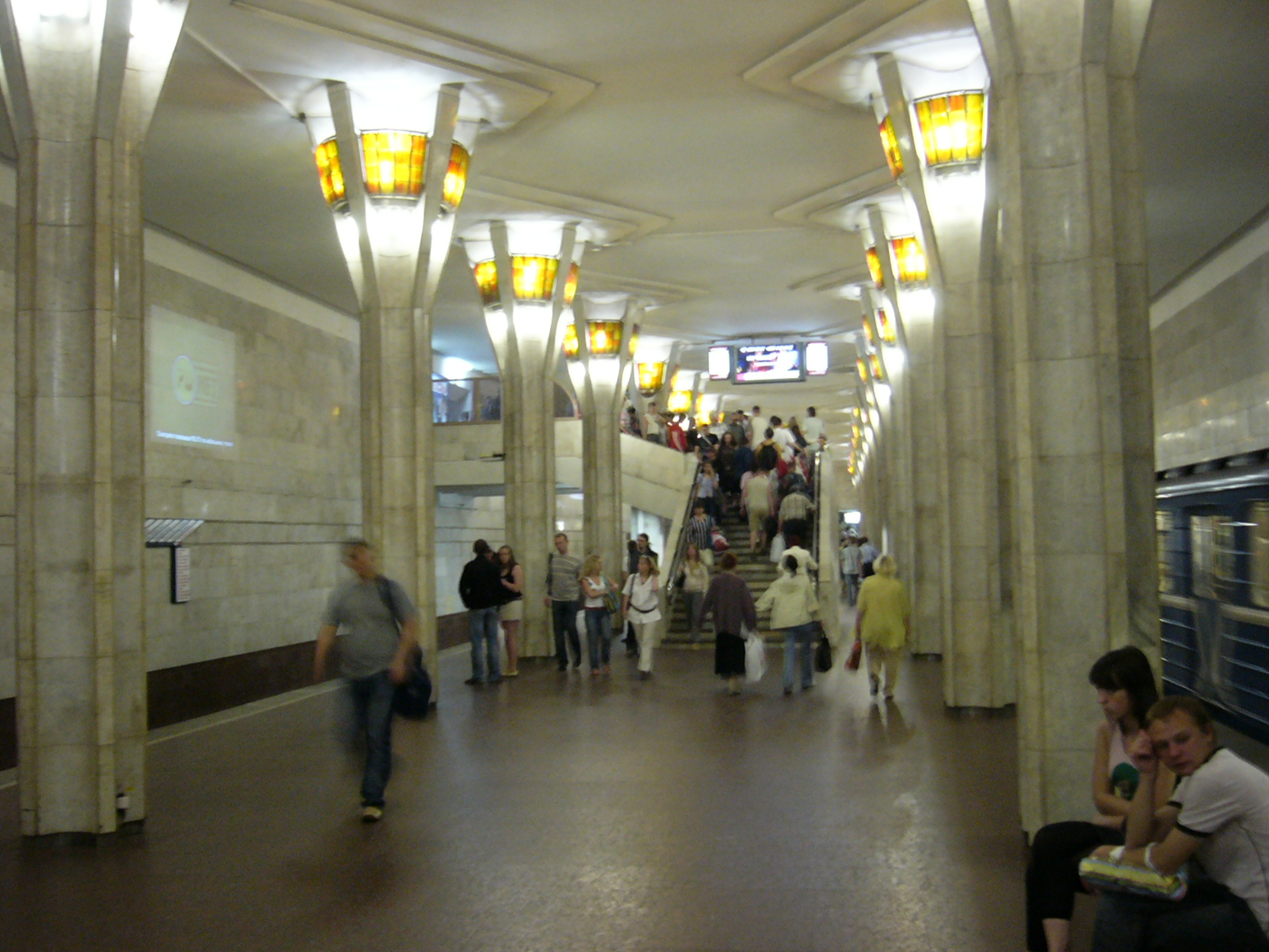 Metro station Oktyabrskaya in Minsk, Belarus